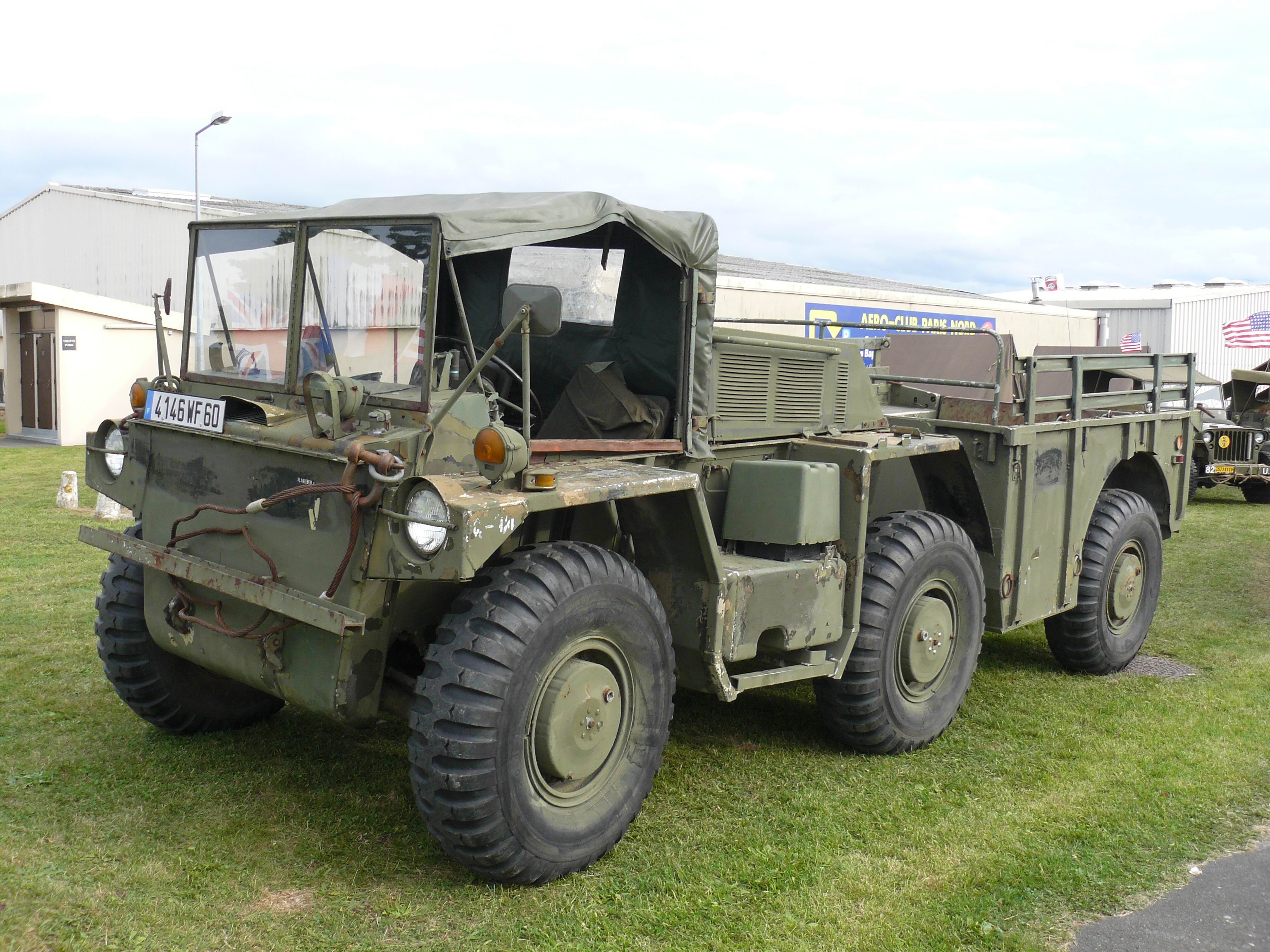 Bernes sur oise